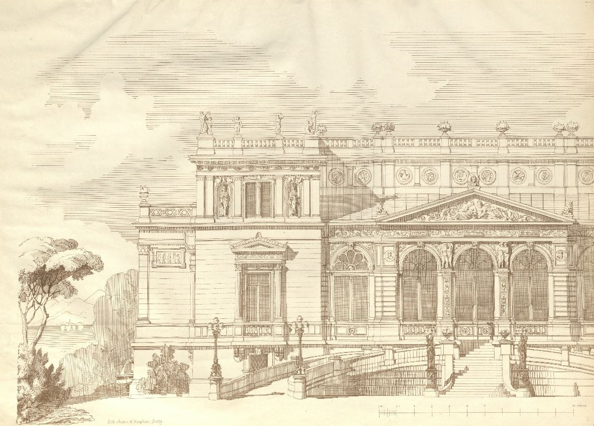 Entwurf zu einem Lusthaus